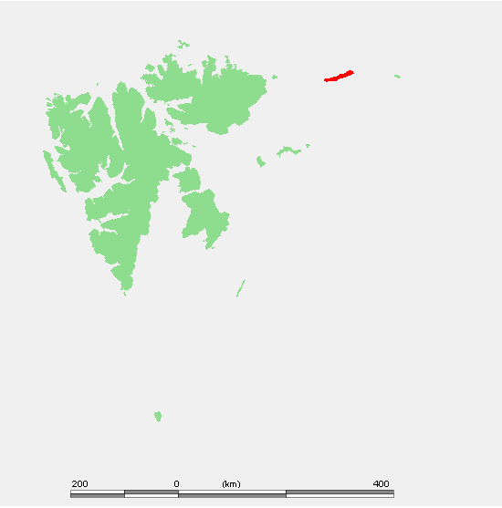 Svalbard Islands - Russia - Spitsbergen - Kvitoya.PNG